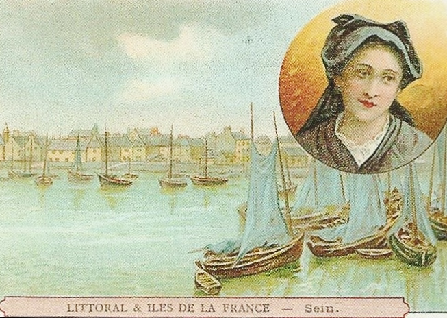 Image représentant l'Île de Sein (datant du début du XXème siècle)